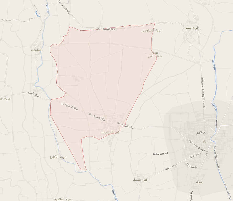 هذه هى قرية بمم احدى قرى محافظة المنوفيه بمصر